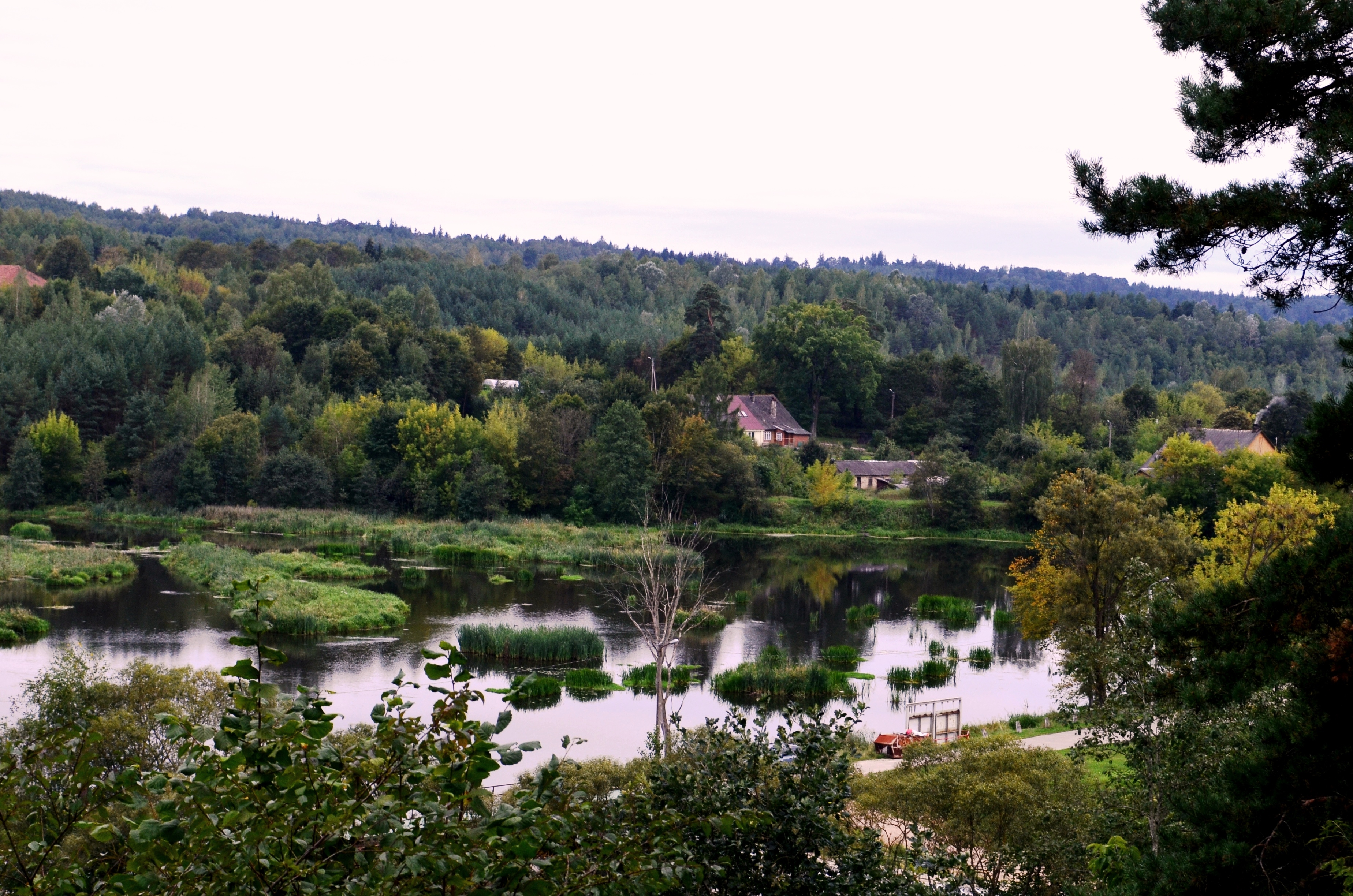 Rokantiškių tvenkinys, N. Vilnios sen., Vilnius